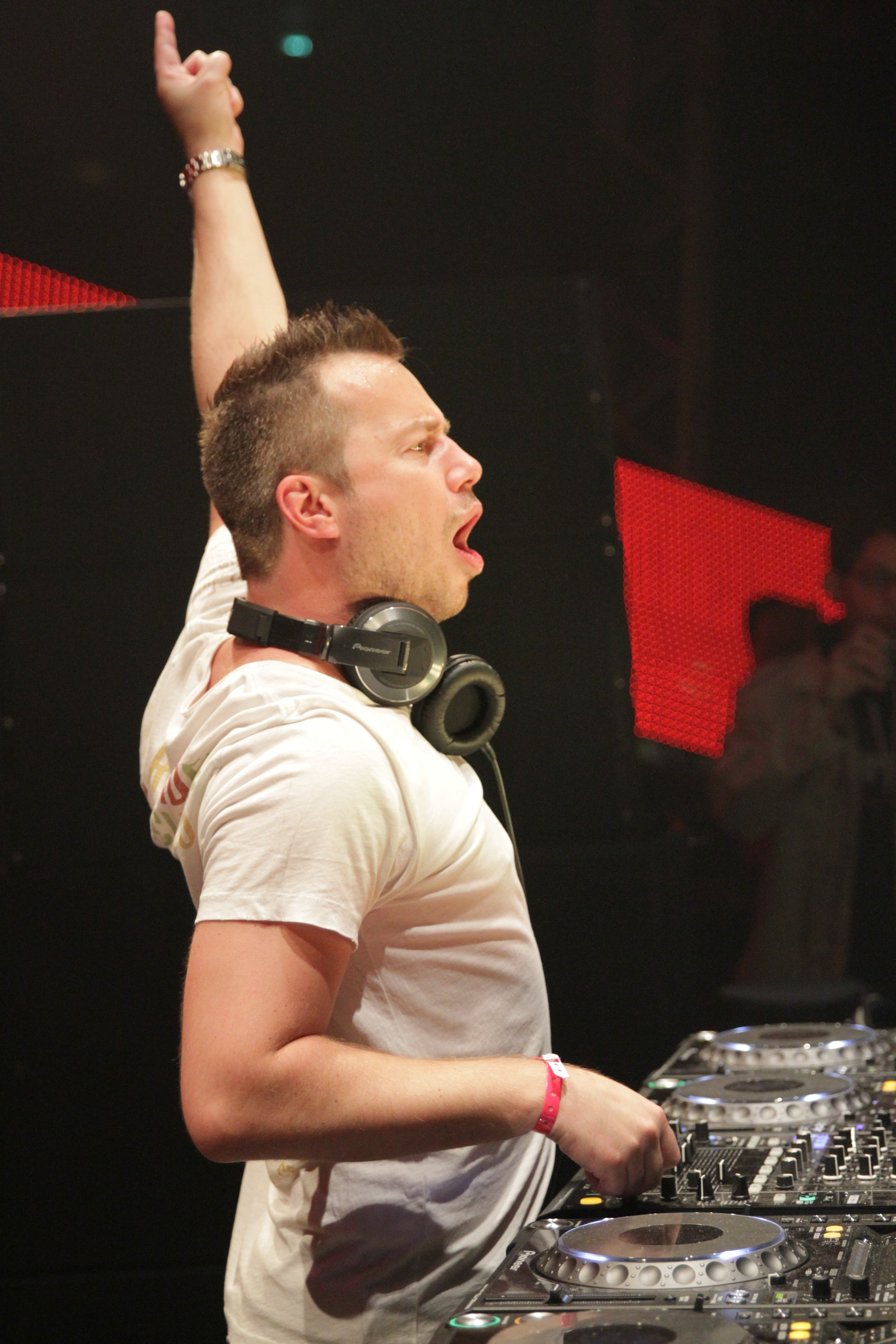 Sander van Doorn bei der Mayday 2014.